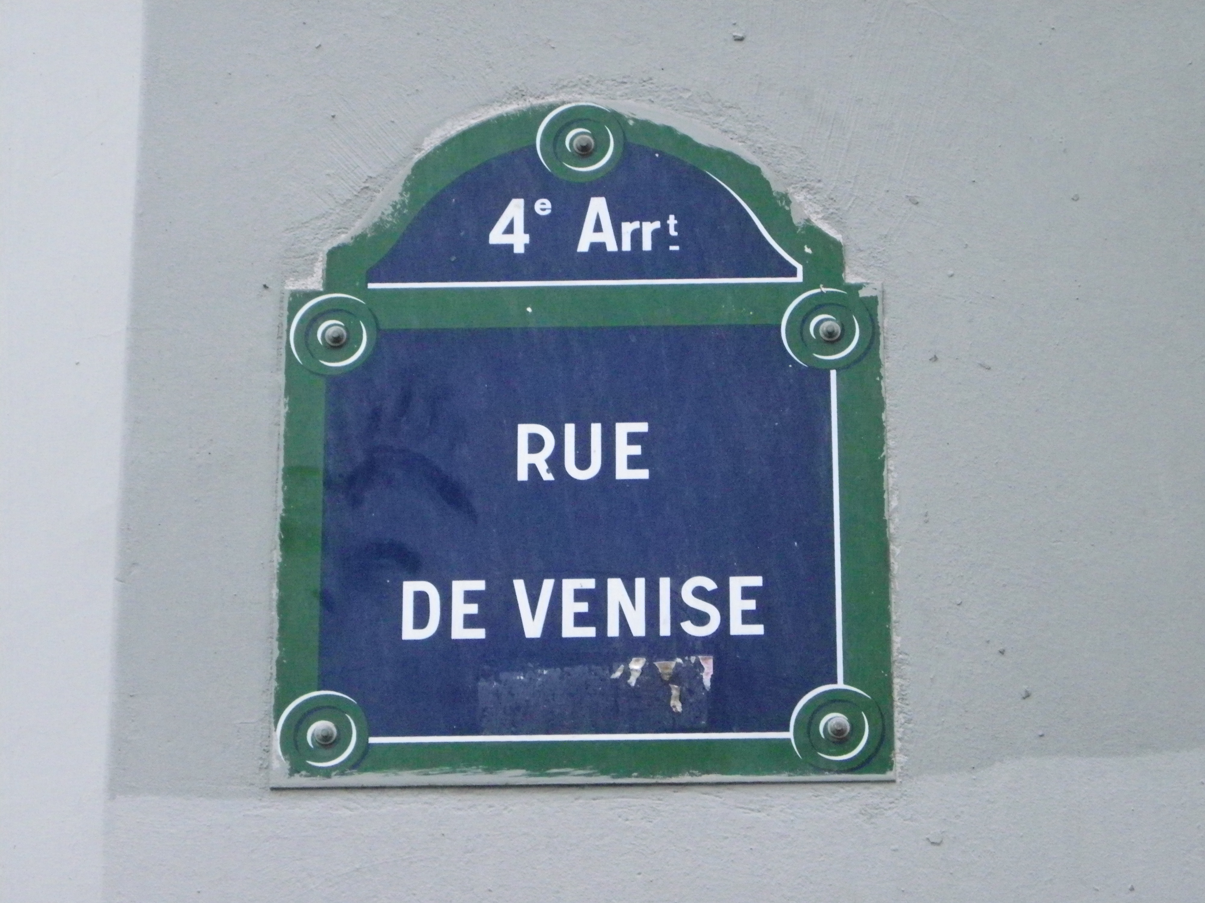 Plaque rue de Venise à Paris